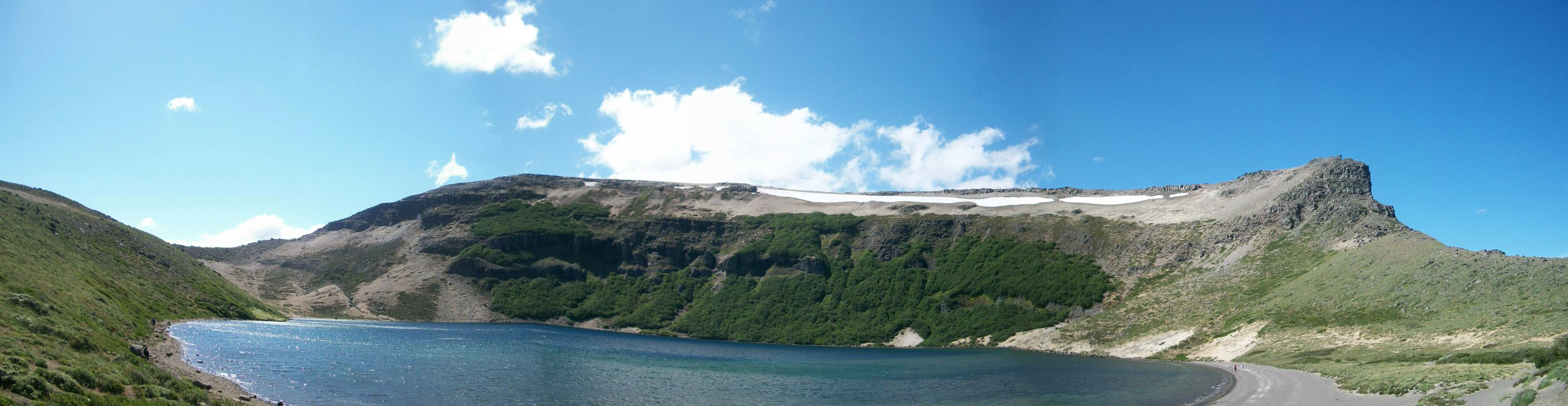 Imagen Panorámica Boca Volcán Batea Mahuida